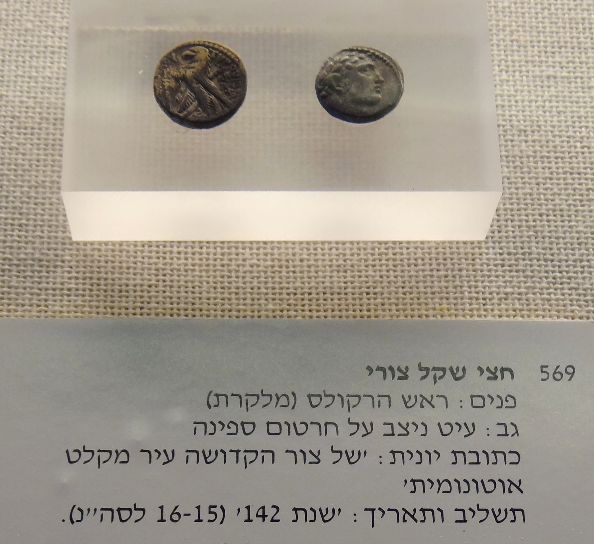 מטמון עספיא התגלה בשנת 1960 בכפר עספיא שבכרמל, מקורו בחוסיפה העתיקה. זהו מטמון הכולל 4,560 מטבעות כסף. המטמון כולל 3,400 מטבעות שקל מצור, 1,000 חצאי שקלים מצור ו-16 דינרים רומיים. באוסף מוזיאון הכט נמצאים 57 שקלים ו-24 חצאי שקלים מצור, ו- 3 דינרים רומיים. השקל הקדום ביותר באוסף הוא משנת 24/25 לפנה"ס והמאוחר ביותר הוא משנת 49/50 לספירה חצי שקל צורי פנים המטבע: ראש הרקולס, גב המטבע: עיט ניצב על חרטום ספינה. תאריך 16/15 לספירה